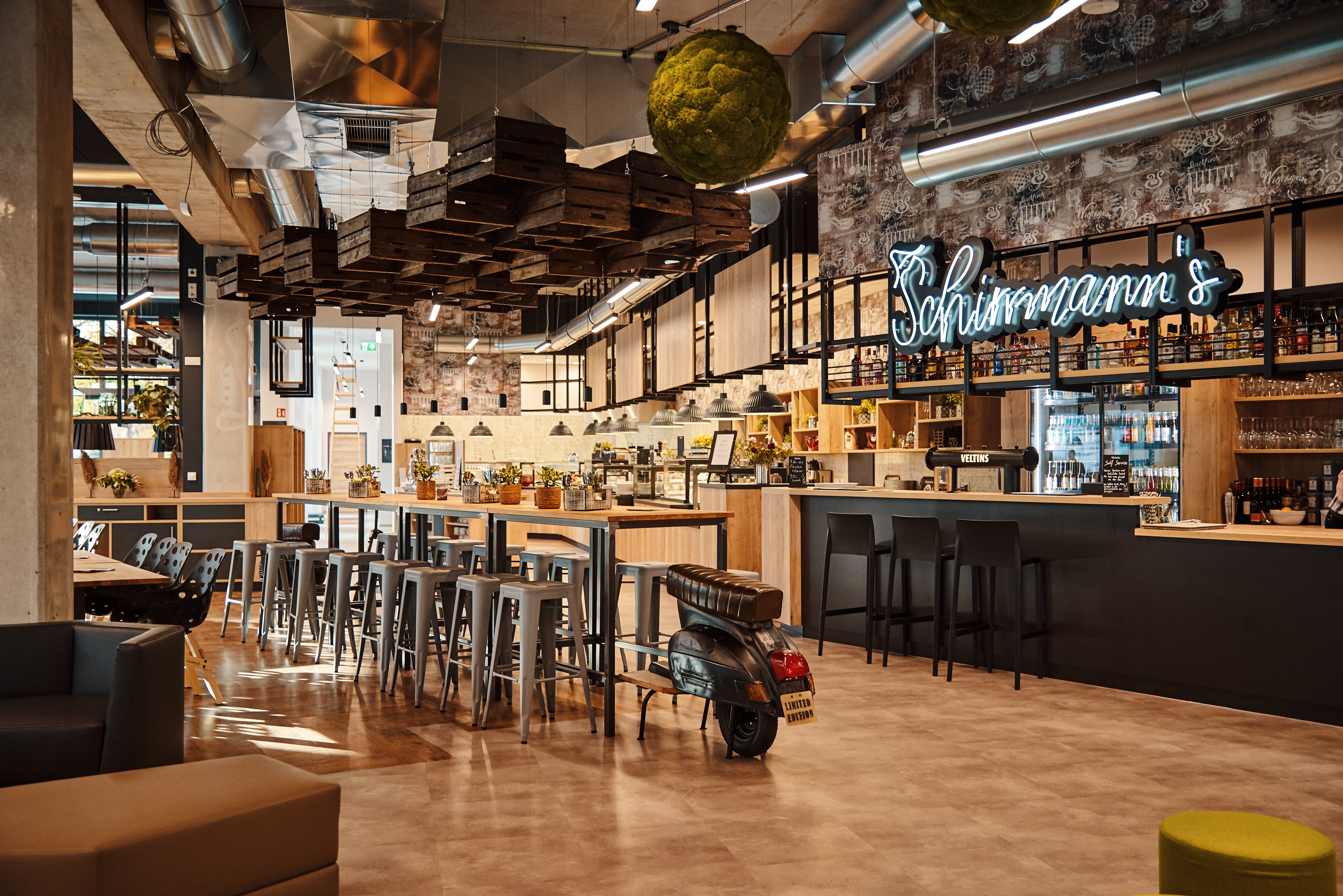 Restaurant Schirrmann´s in der modernisierten DJH Jugendherberge Oldenburg im Nordwesten Deutschlands.